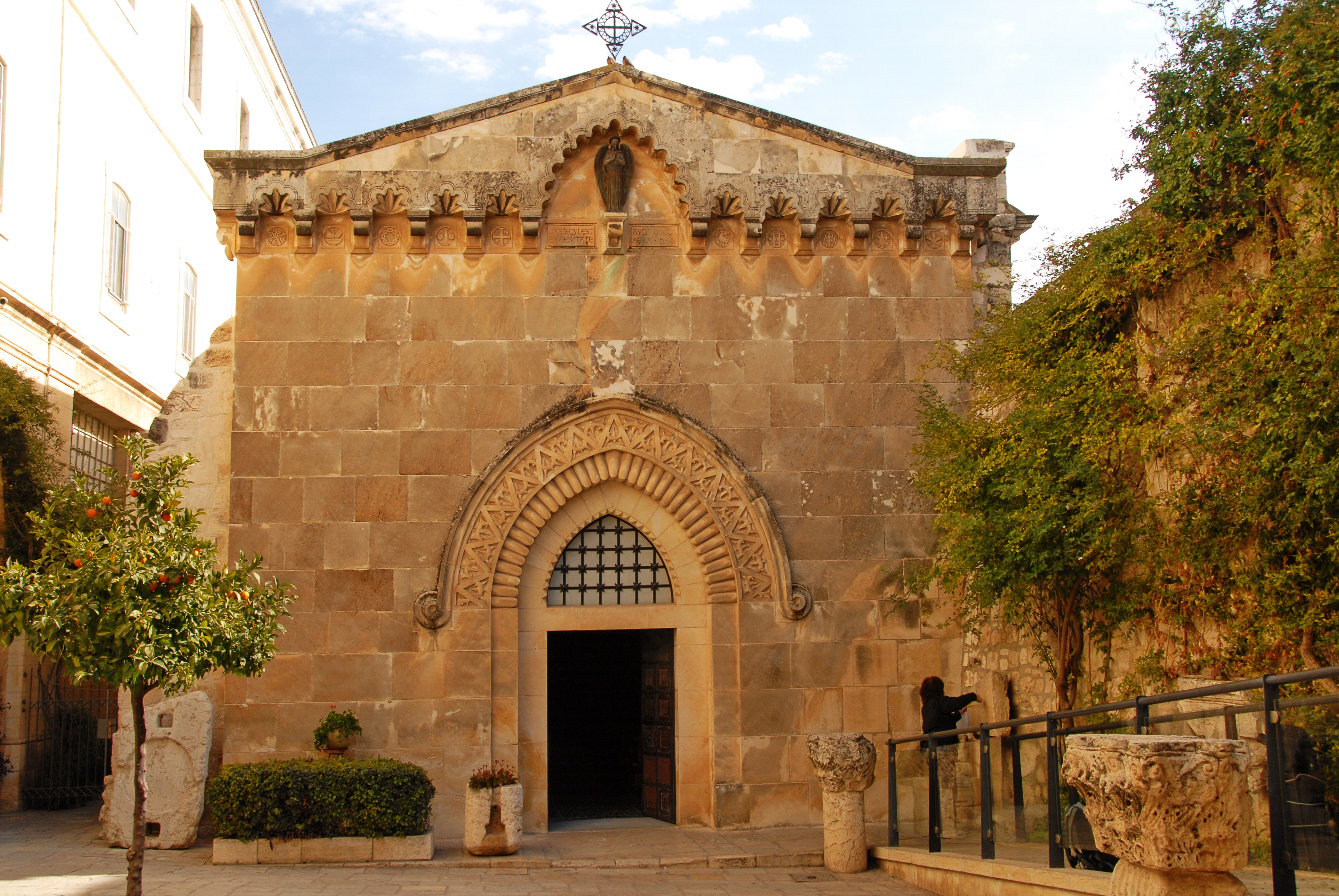 קפלה בעיר העתיקה בירושלים, שנמצאת בתחנה השנייה ב"דרך הייסורים". הקפלה מנציחה את השפלתו של ישו בידי החיילים הרומאים.